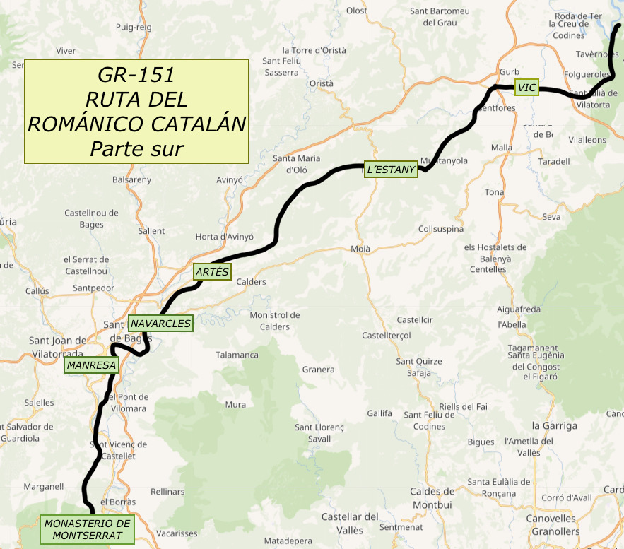 Mapa sendero GR-3 sur románico catalán milenario Abad Oliva